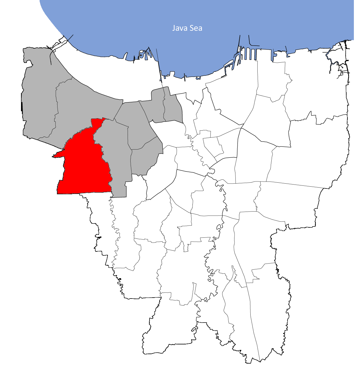 Kembangan;onderdistrict (Kecamatan) van West-Jakarta